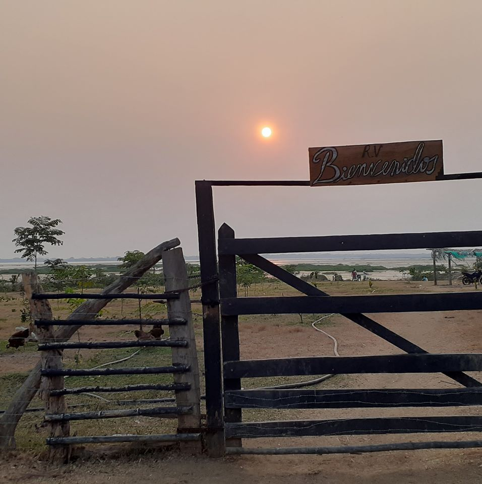 Ricaurte Verde, fundación de tinte ecológico, creada por jóvenes de la comunidad.